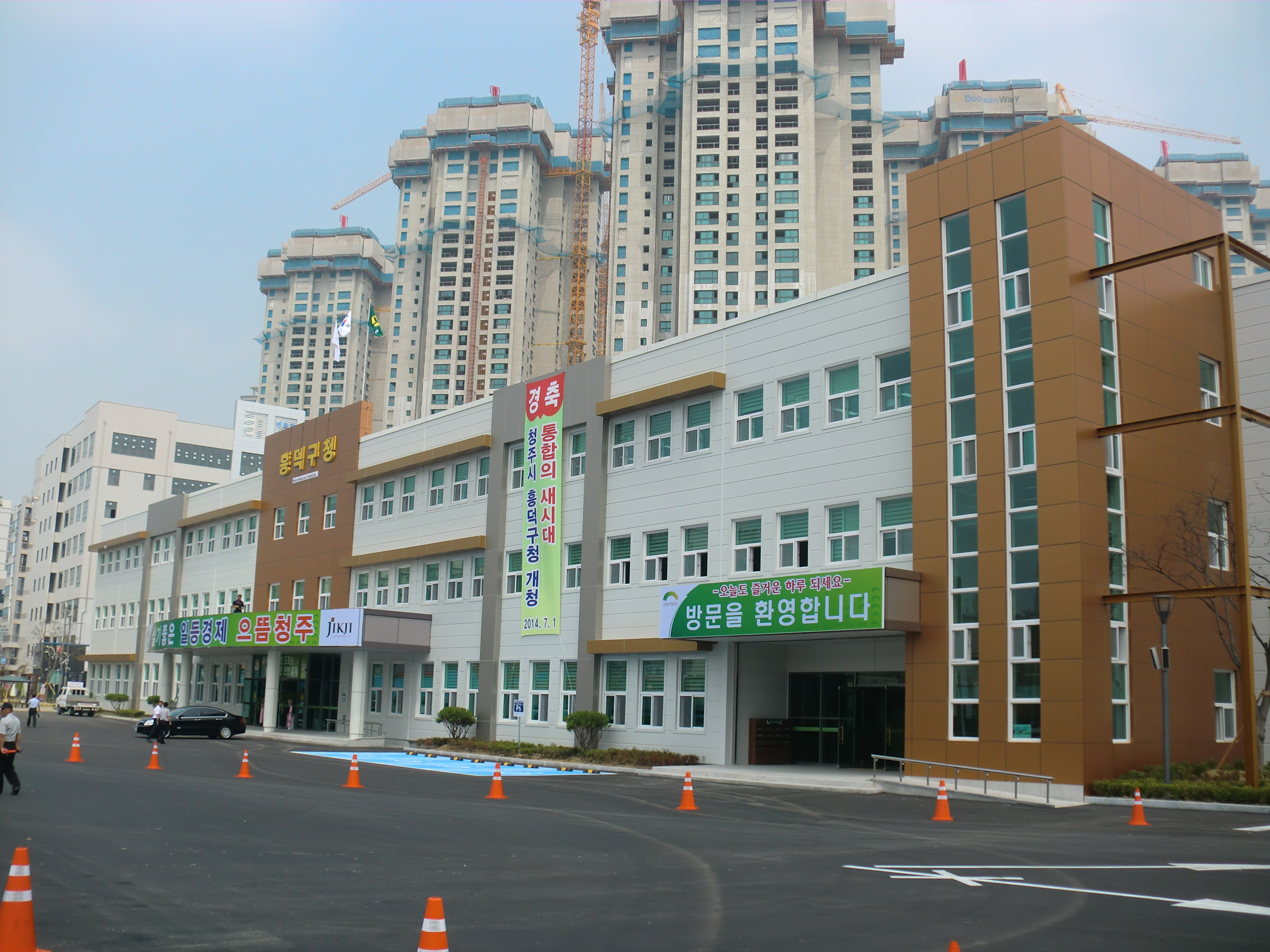 충청북도 청주시 흥덕구에 있는 흥덕구청(임시청사)